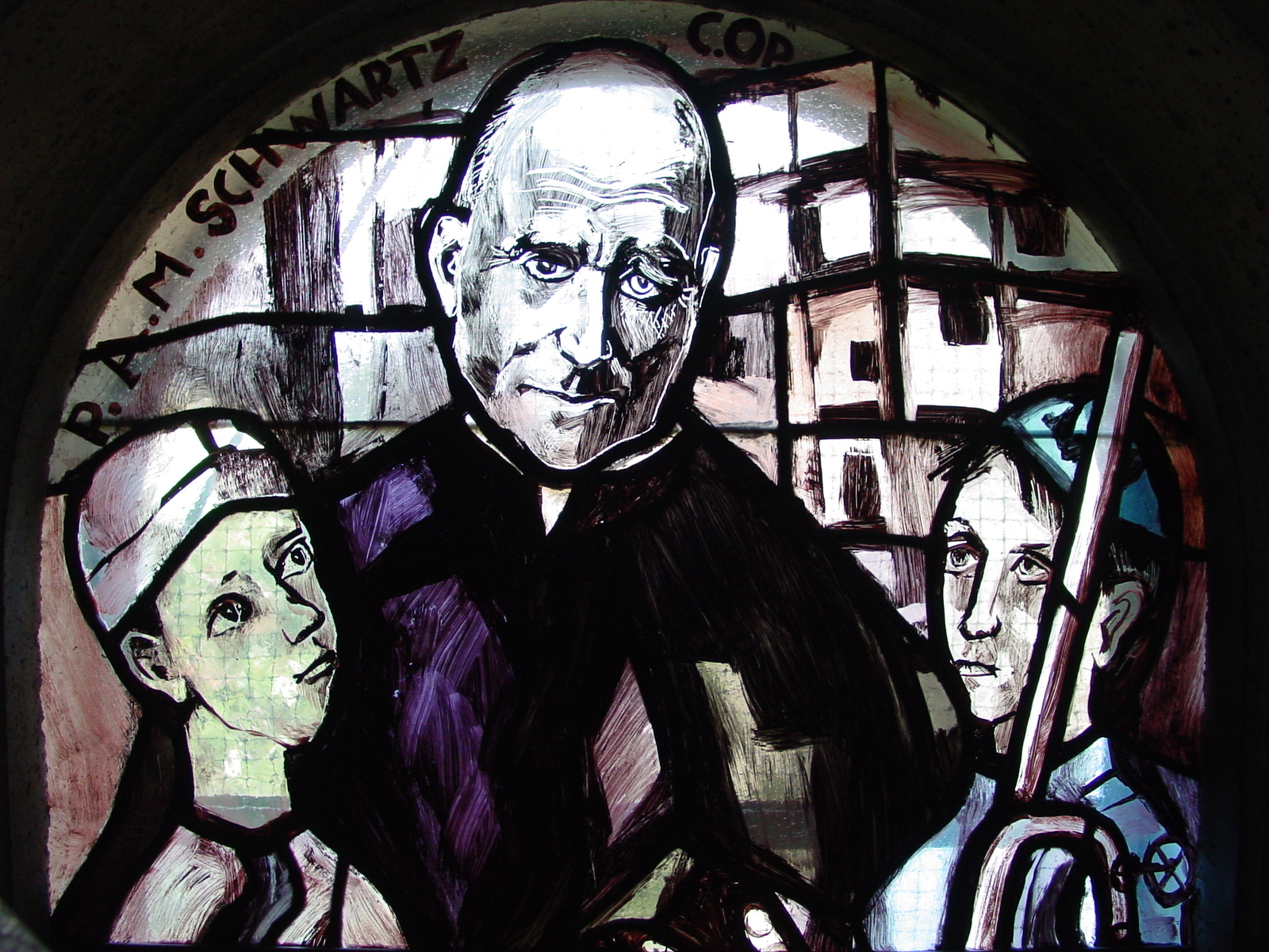 Kirchenfenster von Anton Maria Schwartz in der Pfarrkirche Liesing (Wien 23) Bild von mir aufgenommen im Sommer 2005